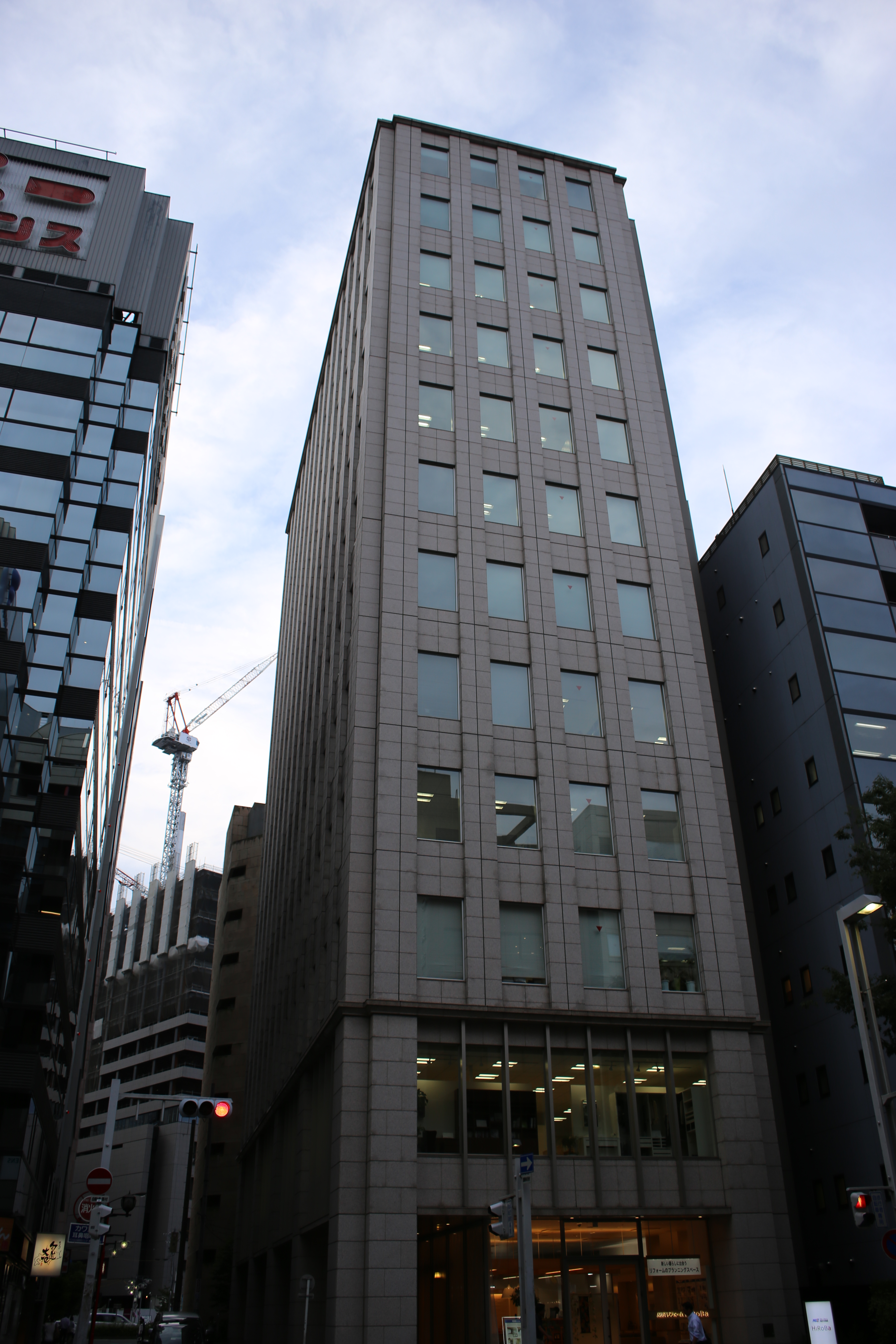 名古屋市中村区名駅四丁目の広小路ガーデンアベニューを南側公道西側より撮影